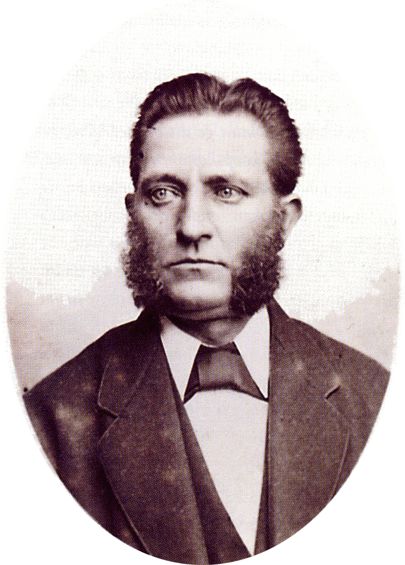 Portret van Willem Hendrik Jordaan (1828-1902)